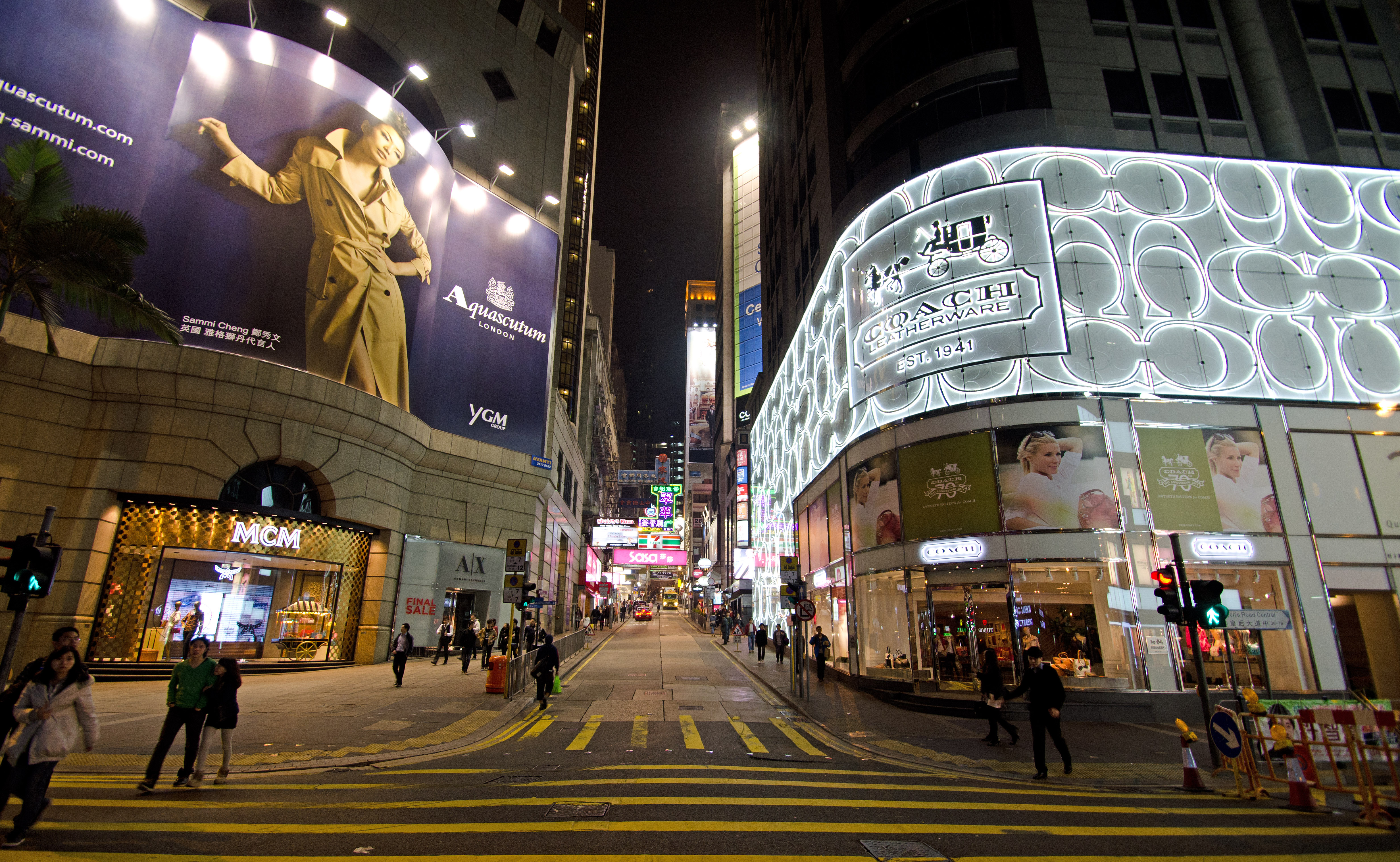 1 D'Aguilar St